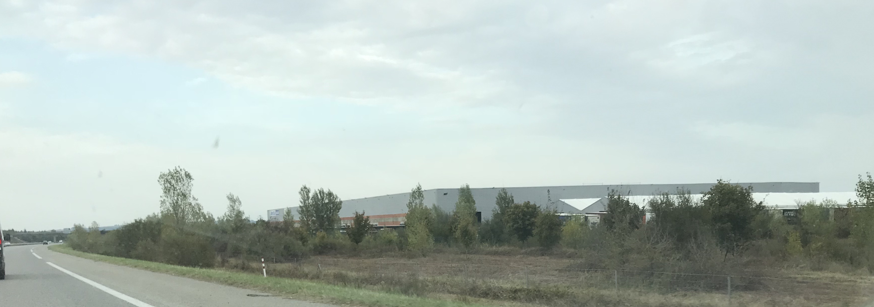 Vue depuis l'autoroute A66 des bâtiments de l'entreprise logistique Denjean, Mazères (Ariège, France).